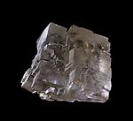 mikroskobik kristal 1